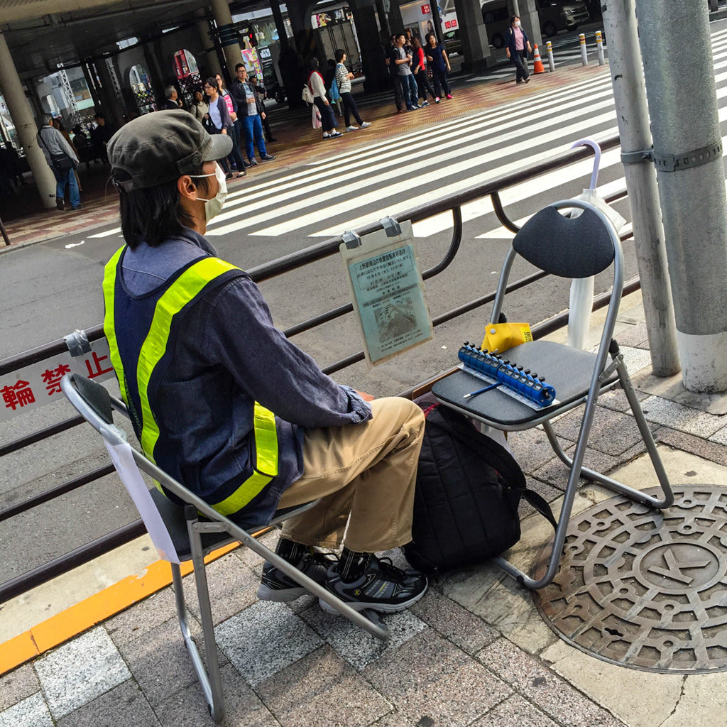 Tokyo, 22/10/15 交通量#交通量調査